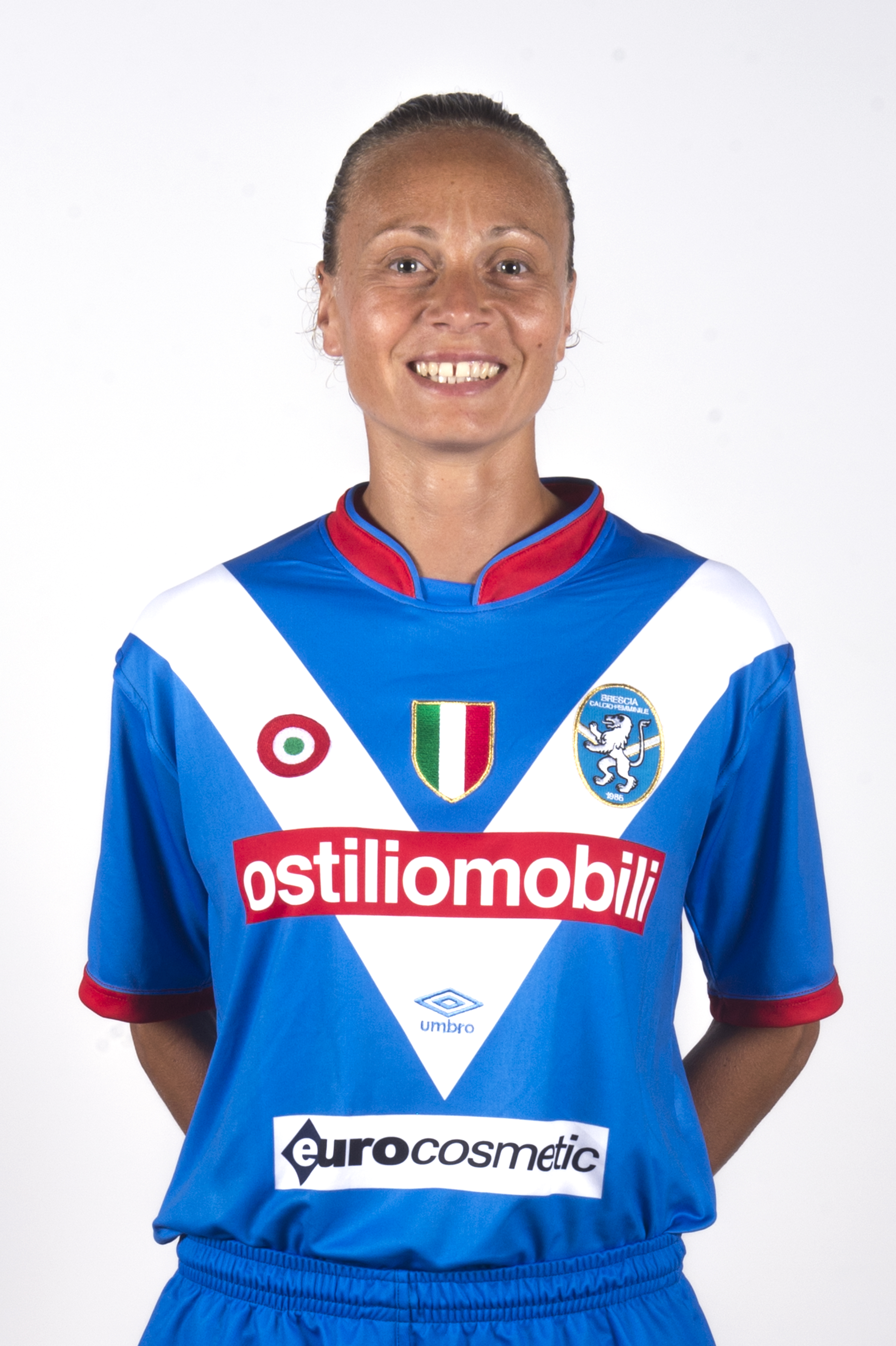 Roberta D'Adda, difensore, foto ufficiale Brescia Calcio Femminile stagione 2016-2017.